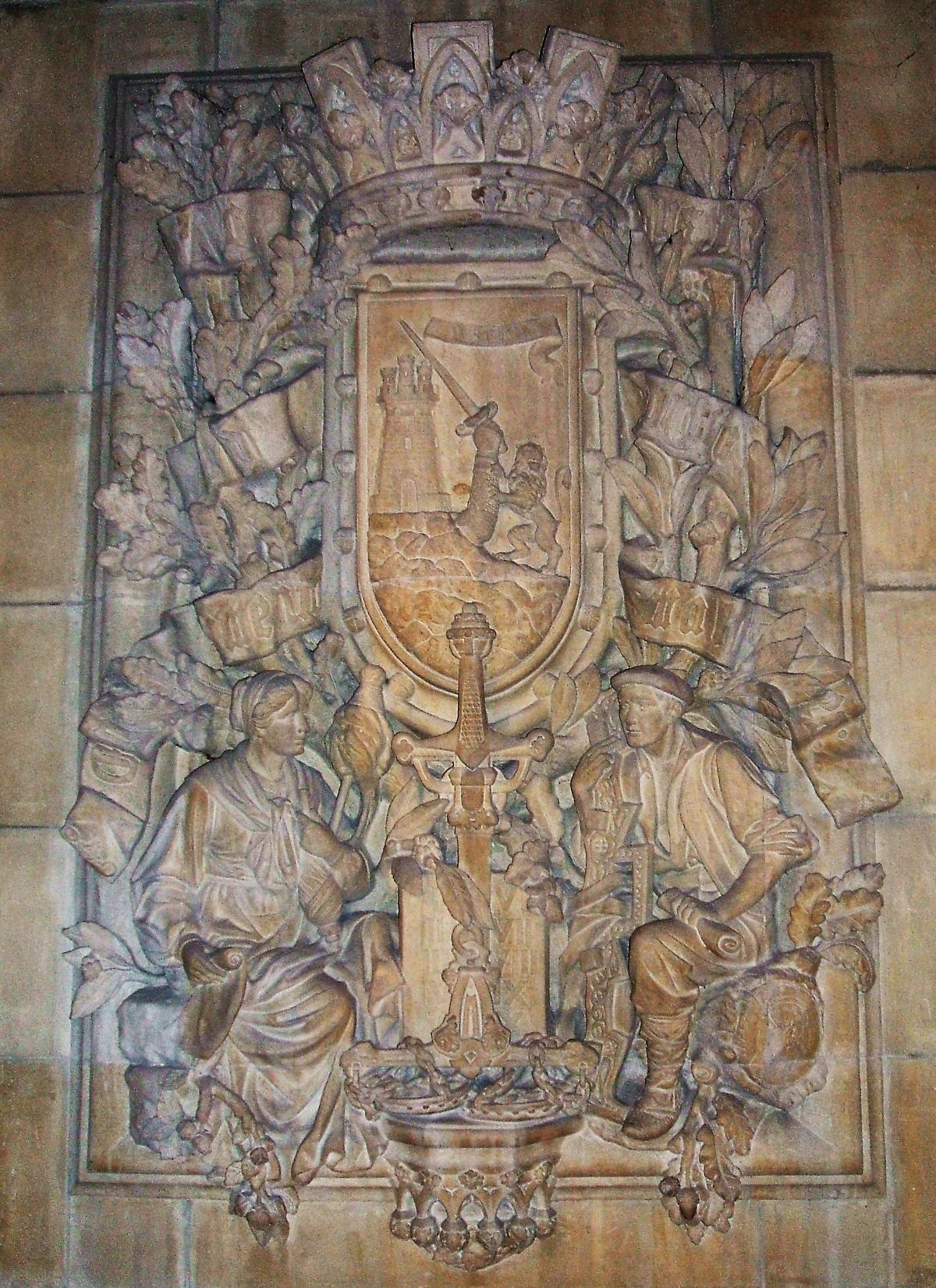 Relieve de la capilla absidial de Álava en la girola de la Catedral Nueva de Vitoria-Gasteiz